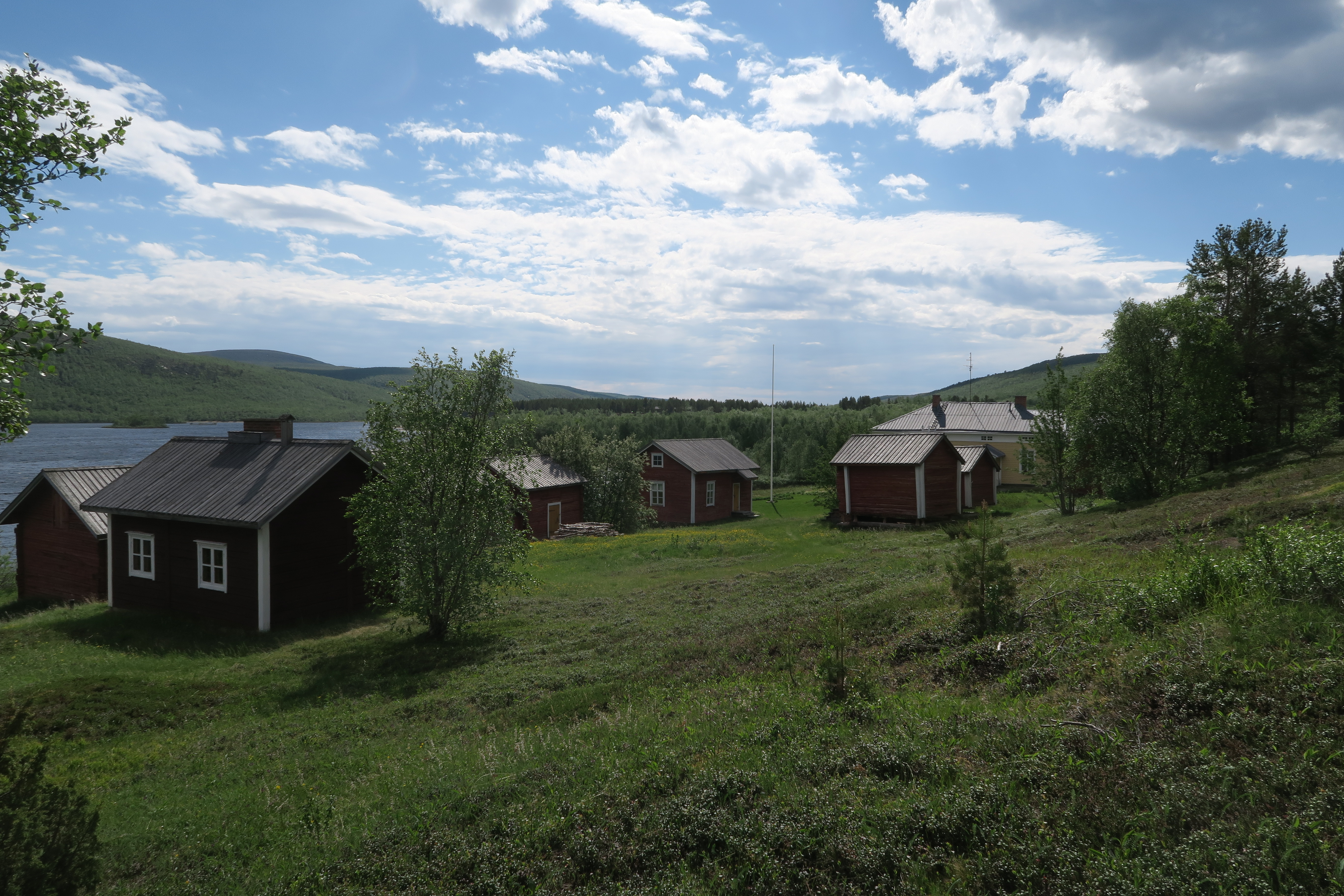 Utsjoen pappilan pihapiiriä kirkkotuvilta päin nähtynä